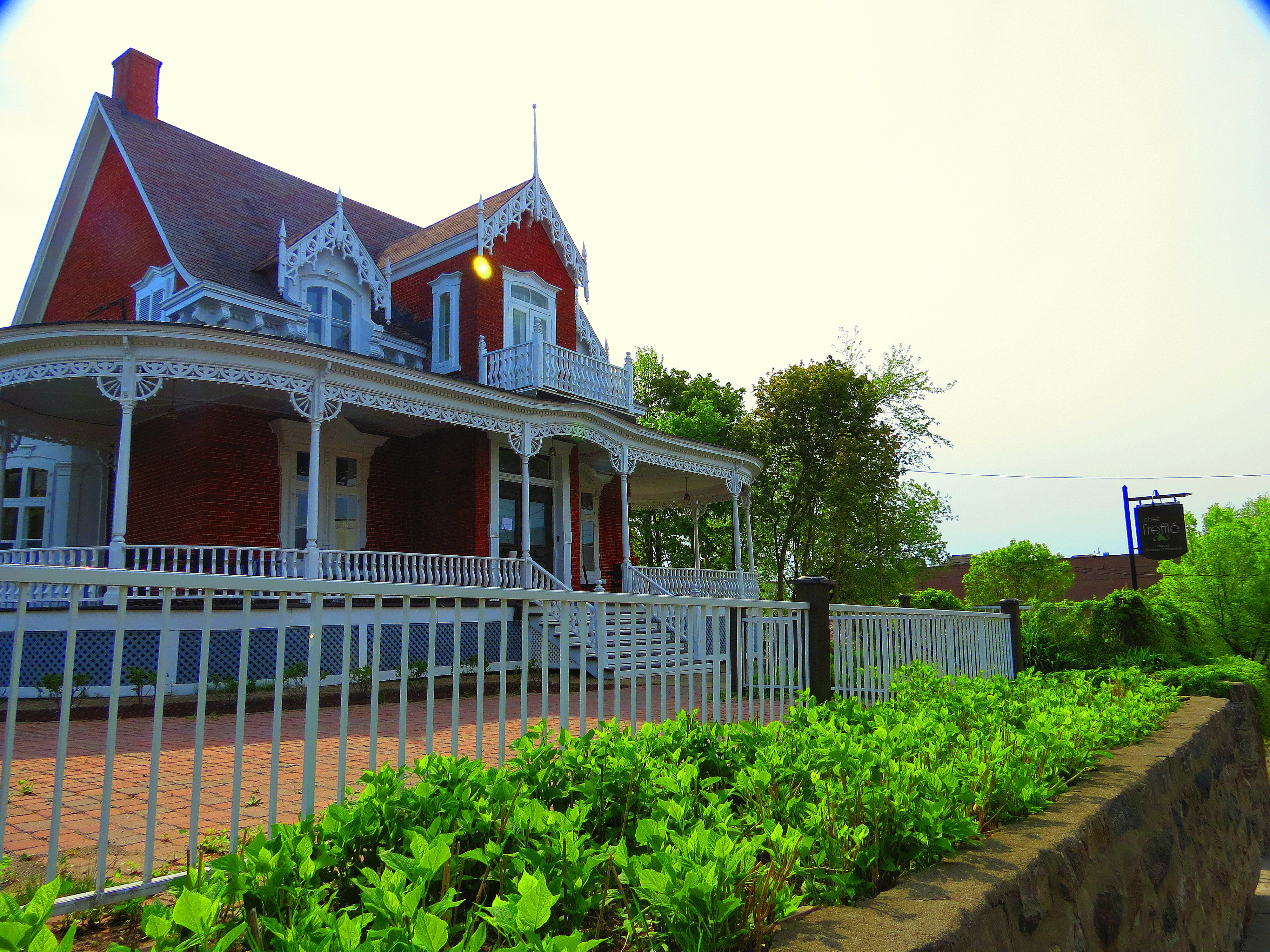 La maison Joseph-Trefflé-Caya, citée monument historique, est une résidence bourgeoise s'inscrivant dans le courant de l'éclectisme victorien construite entre 1878 et 1884. La maison est devenue depuis plusieurs année un restaurant et a changer de nom de nombreuse foix. depuis 2012, il porte le du restaurent Chez Trèffler. La maison est situé au 209, rue Brock à Drummondville.